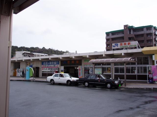 West Japan Railway Sanyo Main Line Kasaoka Station 西日本旅客鉄道 山陽本線 笠岡駅